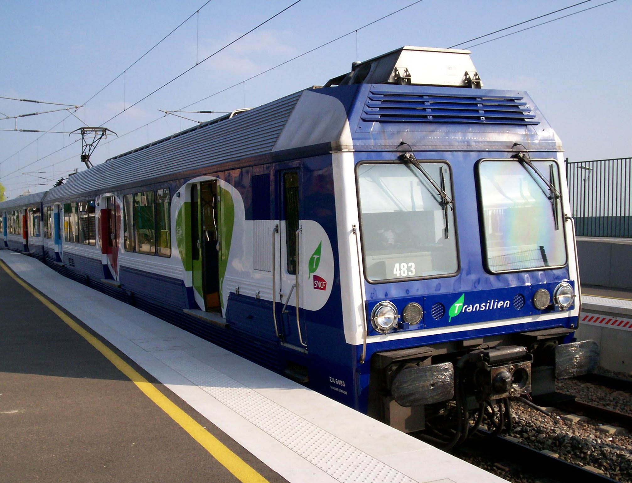 Rame GCO au terminus Noisy-le-Roi